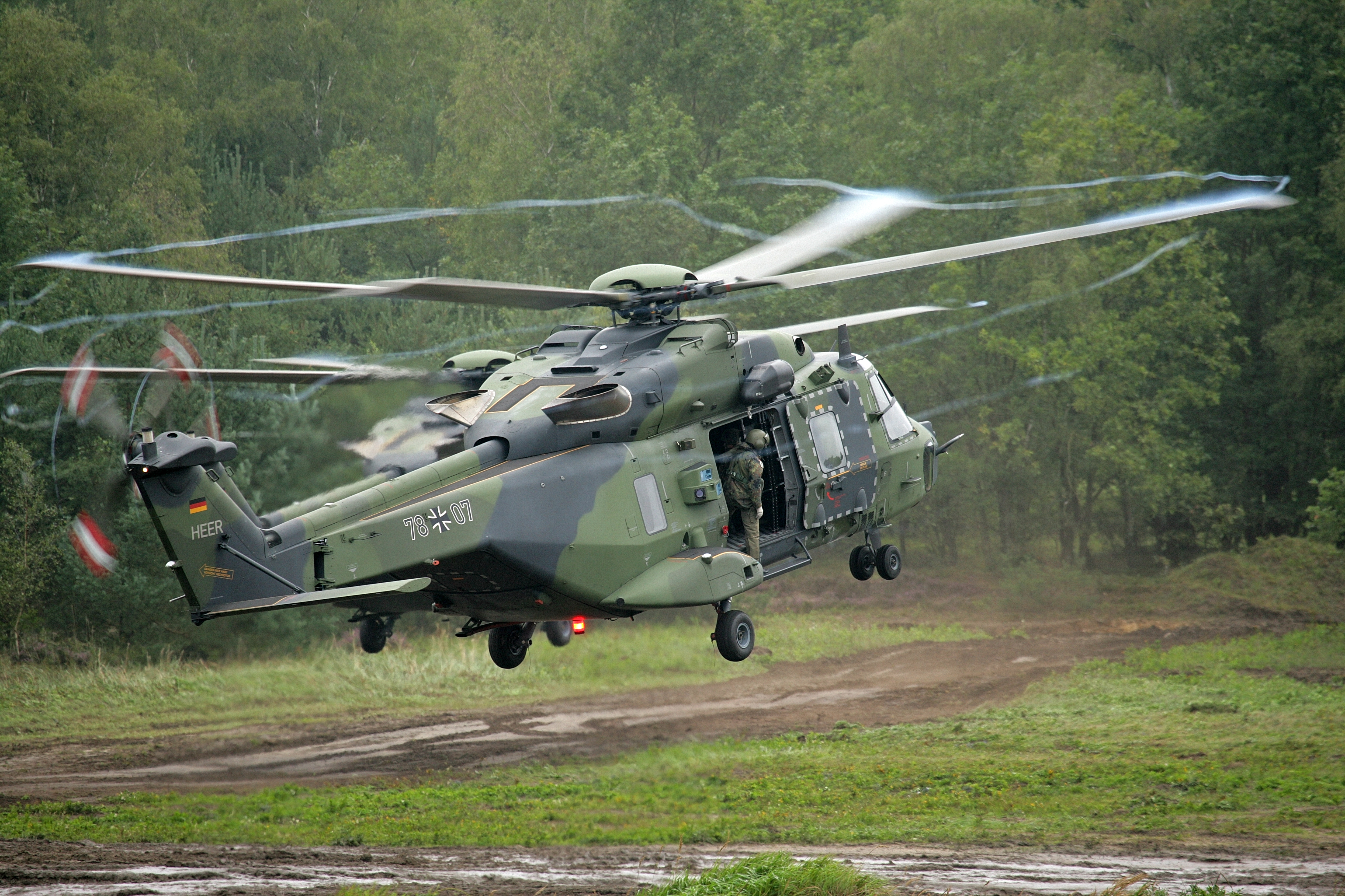 Landung des Mehrzweckhubschrauber NH90 auf dem Truppenübungsplatz Munster. Mit dem NH90 können sowohl schwere Lasten, technisches Material oder 20 Soldaten transportiert werden. Vorüben der Informationslehrübung Heer. Die Panzerlehrbrigade 9 stellt vom 4. bis 10. September die Fähigkeiten des deutschen Heeres auf dem Truppenübungsplätzen Munster und Bergen vor. Unterstützt wird die Lehrbrigade dabei vom Ausbildungszentrum Munster. In diesem Jahr wird das heutige und zukünftige Aufgabenspektrum des deutschen Heeres in dieser Lehrübung dargestellt. Die Informationslehrübung richtet sich in erster Linie an den Führernachwuchs der Bundeswehr, der Offizierschule des Heeres und Soldaten ausländischer Streitkräfte. ©Bundeswehr/Mandt